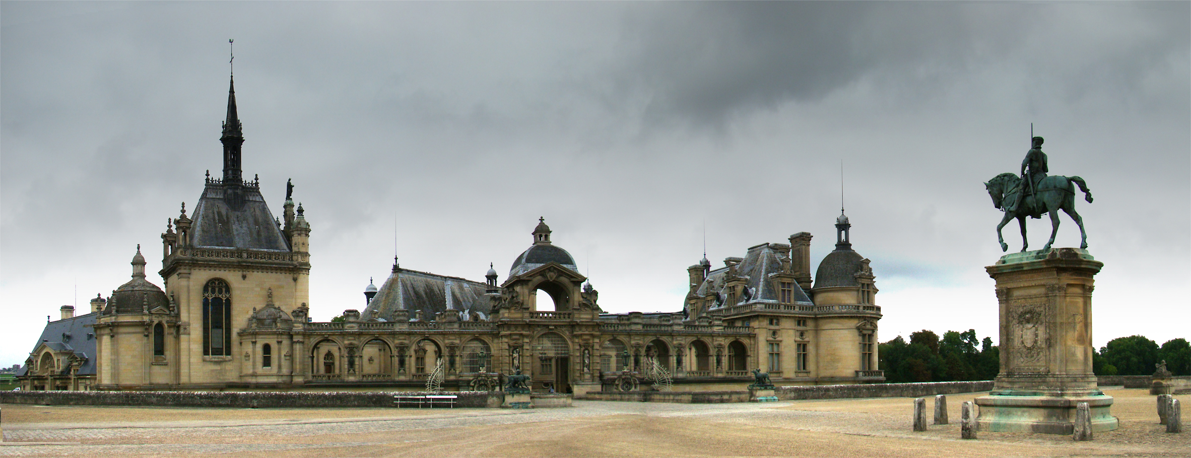 Château de Chantilly, Oise, Picardie, France.